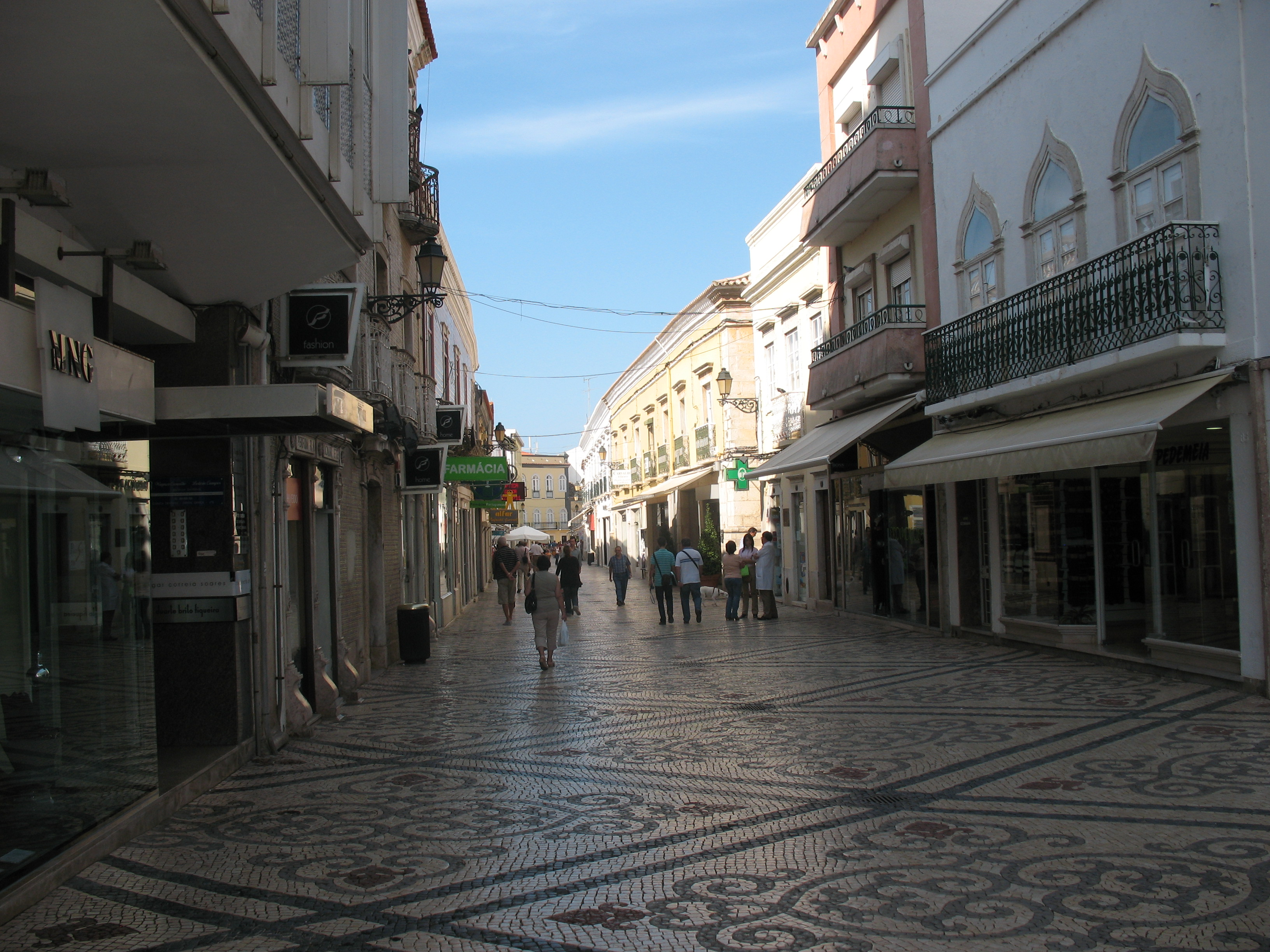 Пешеходная улица в центре старого Фару.